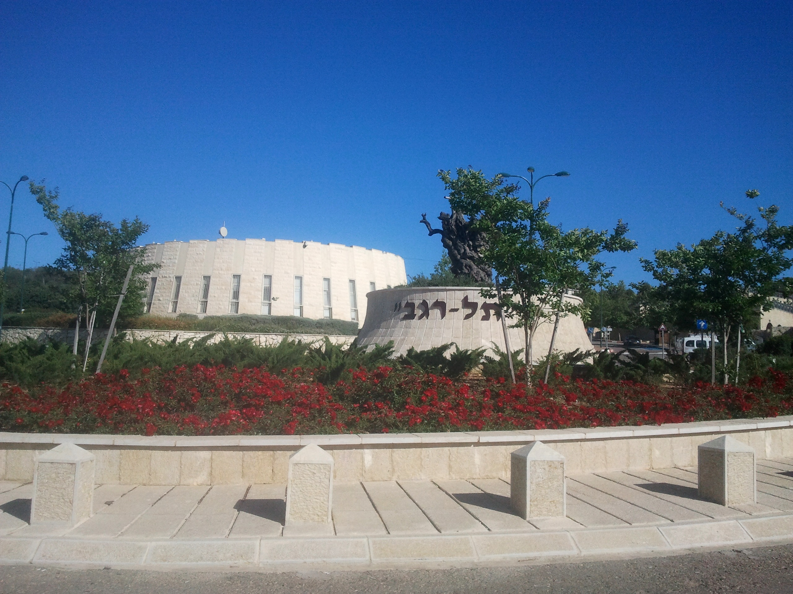 בית הקבות תל רגב שוכן ליד כביש 70 האמצע הדרך בין מחלף יגור למחלף סומך. הוא משרת את תושבי חיפה והקריות כיכר בכניסה לבית הקברות